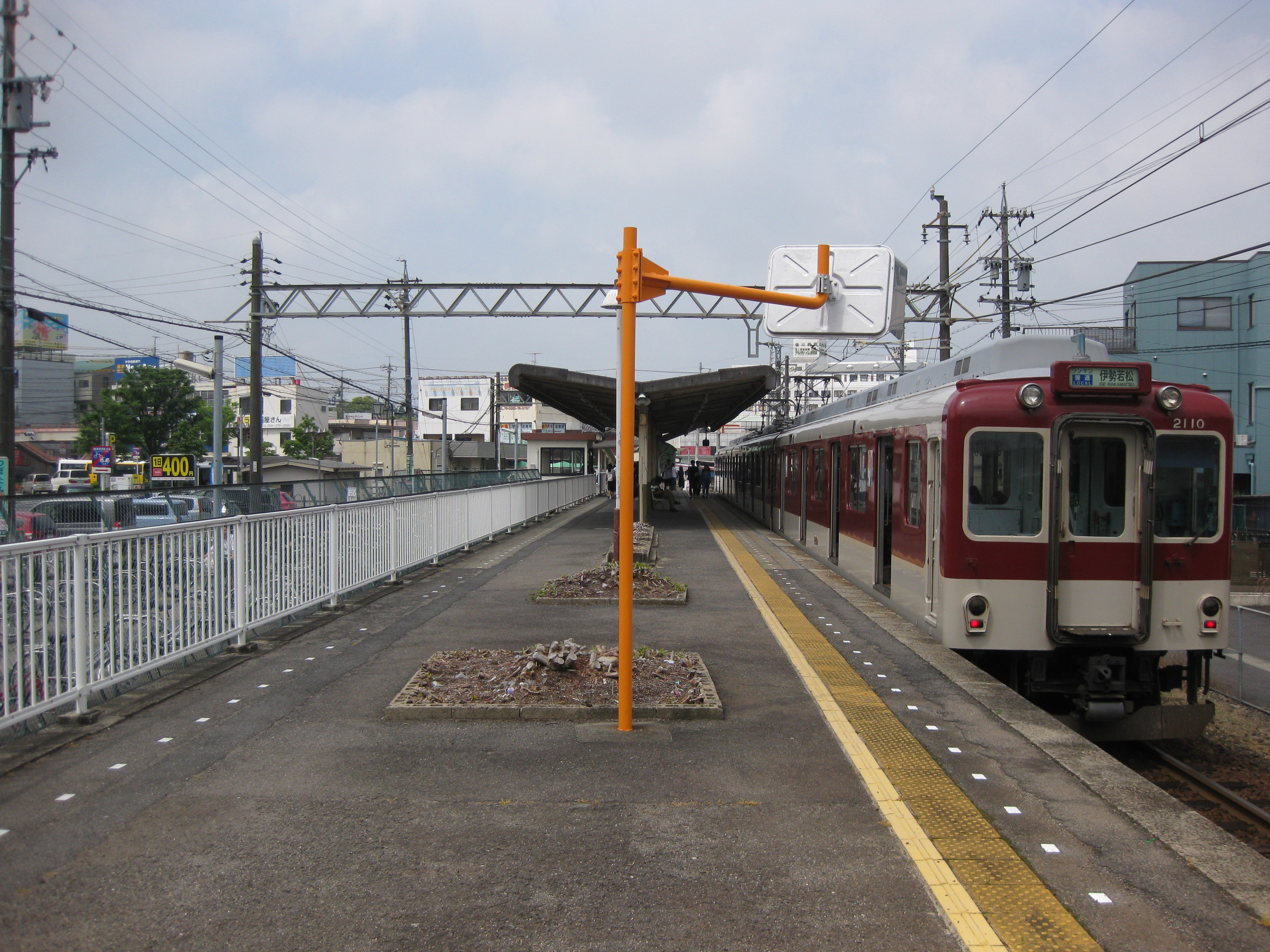 平田町駅プラットホーム